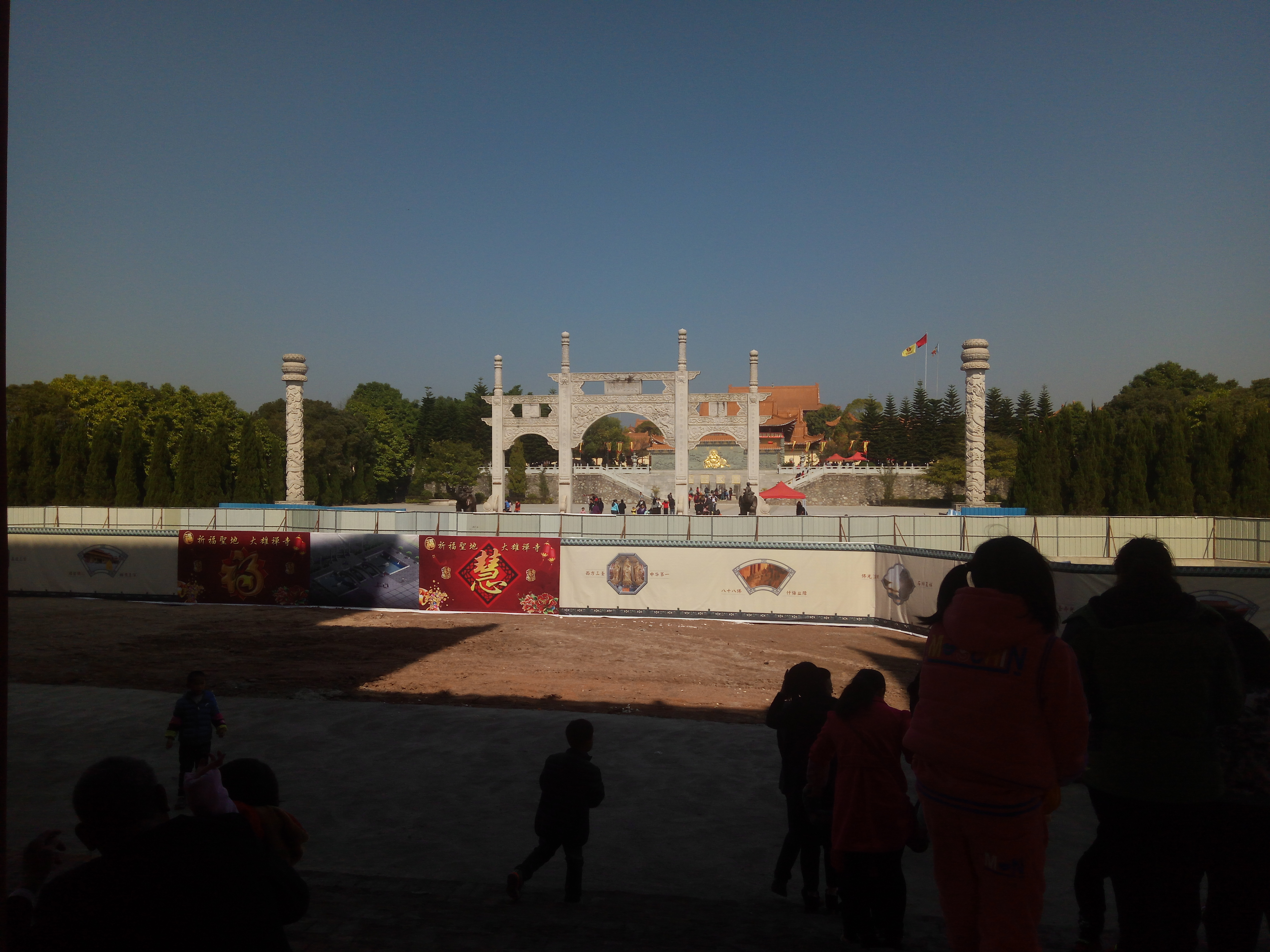 南雄市珠玑镇大雄禅寺